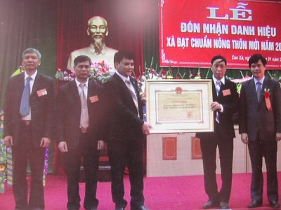 Cao Xá đạt chuẩn nông thôn mới